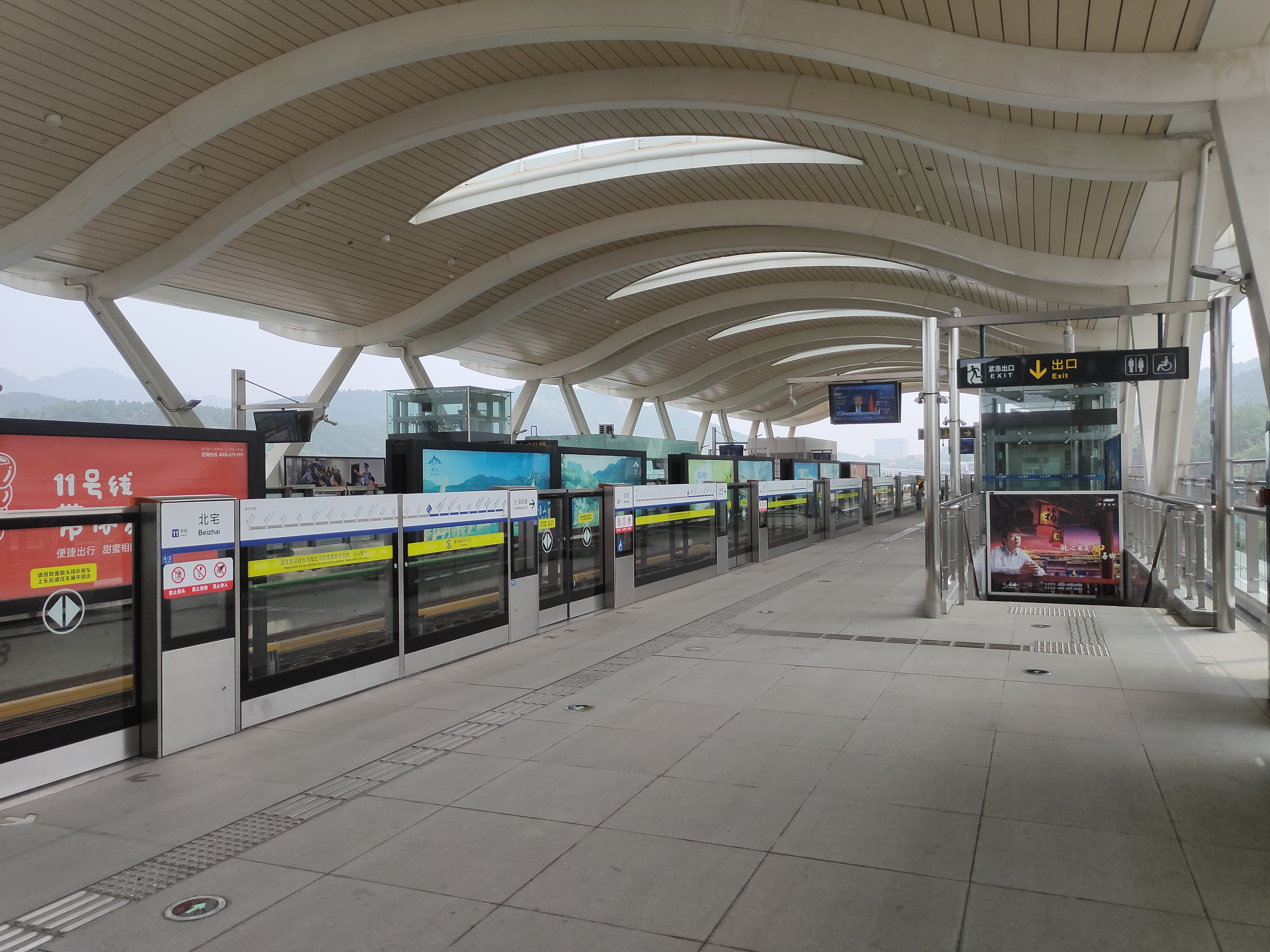 中文（中国大陆）: 青岛地铁11号线北宅站站台